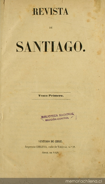 Revista de Santiago: tomo primero, abril-agosto de 1848